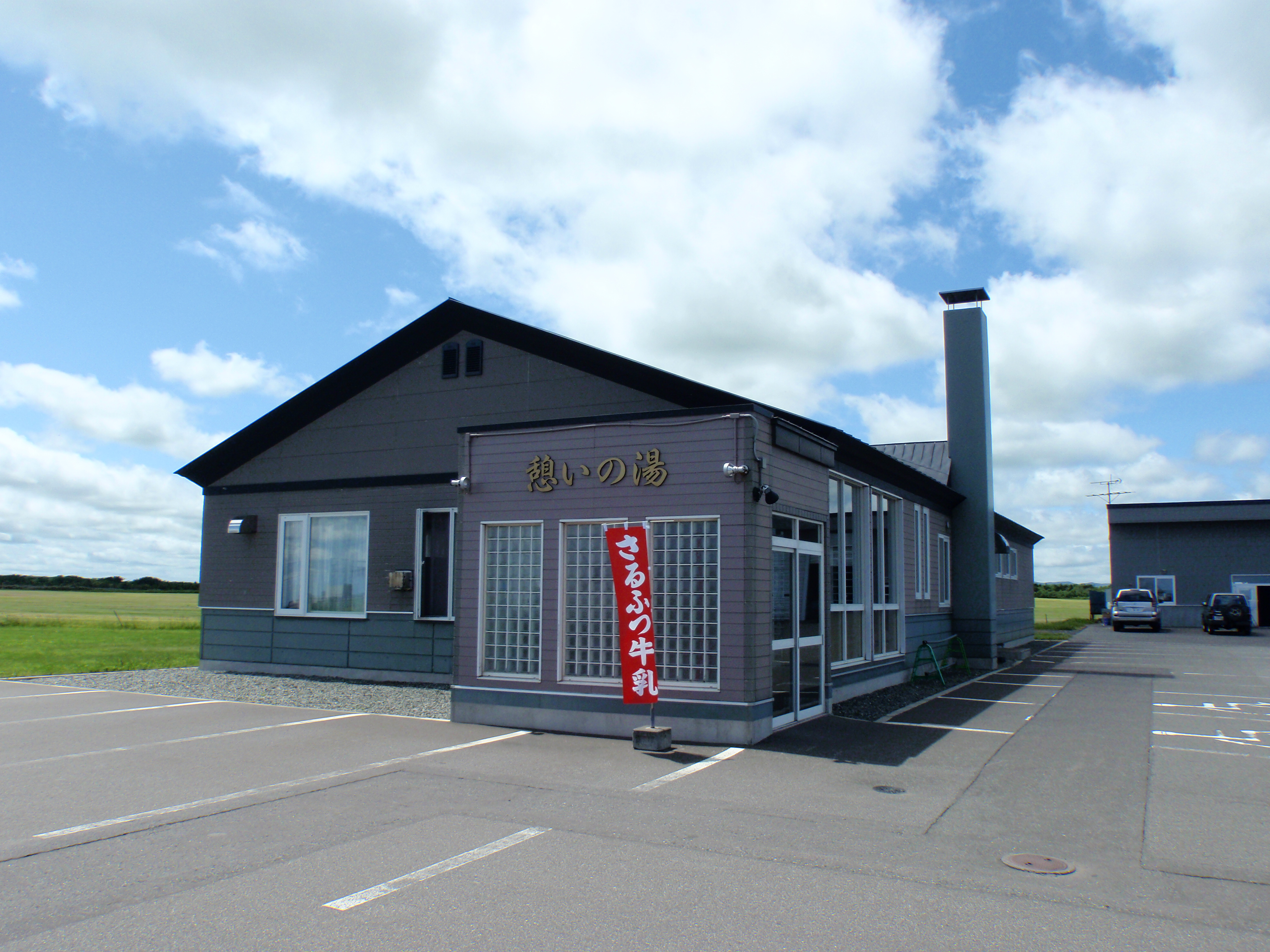 猿払村公衆浴場「憩いの湯」